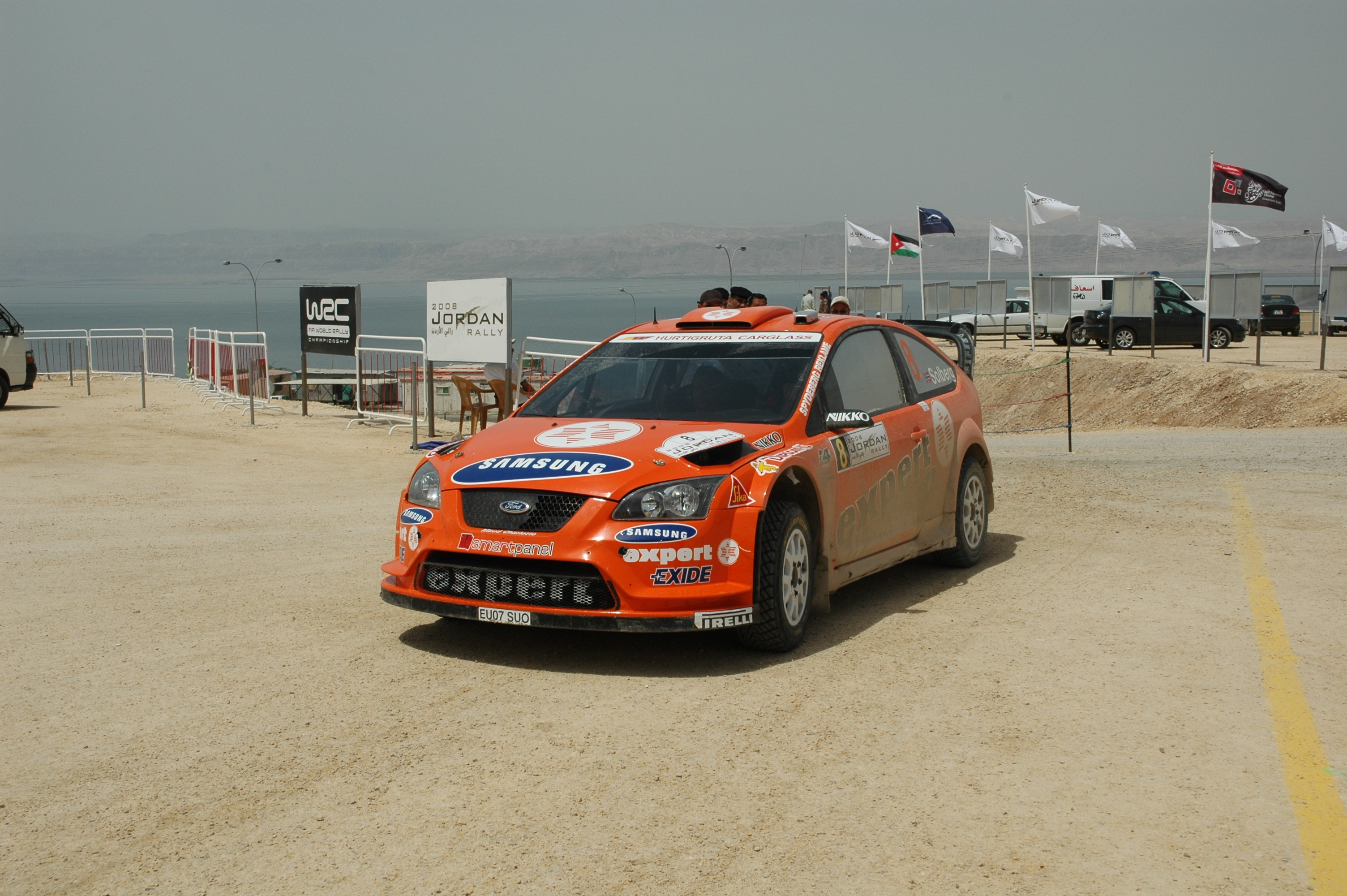 Henning Solberg after a stage